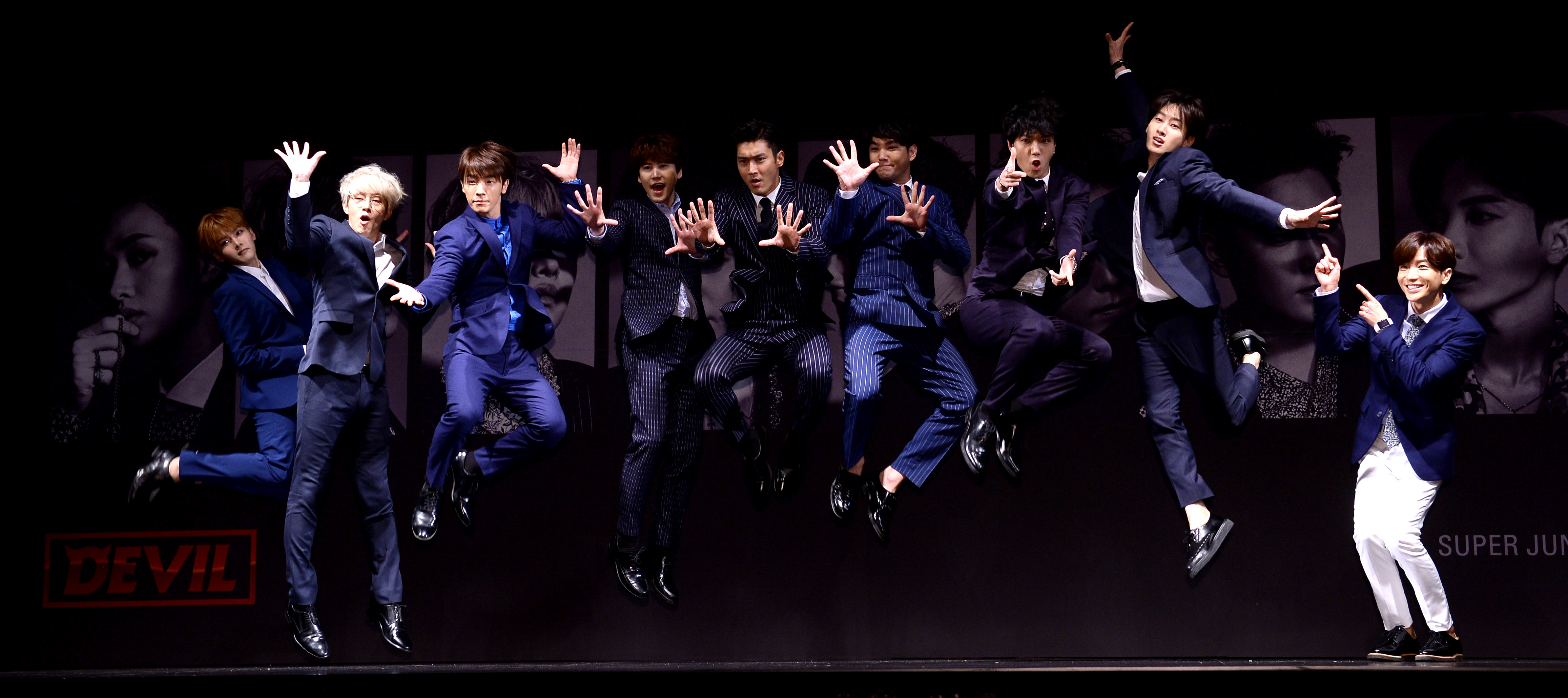 슈퍼주니어 멤버들이 15일 오후 서울 강남구 삼성동 코엑스 아티움에서 열린 스페셜 앨범 'Devil' 발매 기념 기자회견에서 인사를 하고 있다. 2015.07.15 / 이석우 기자